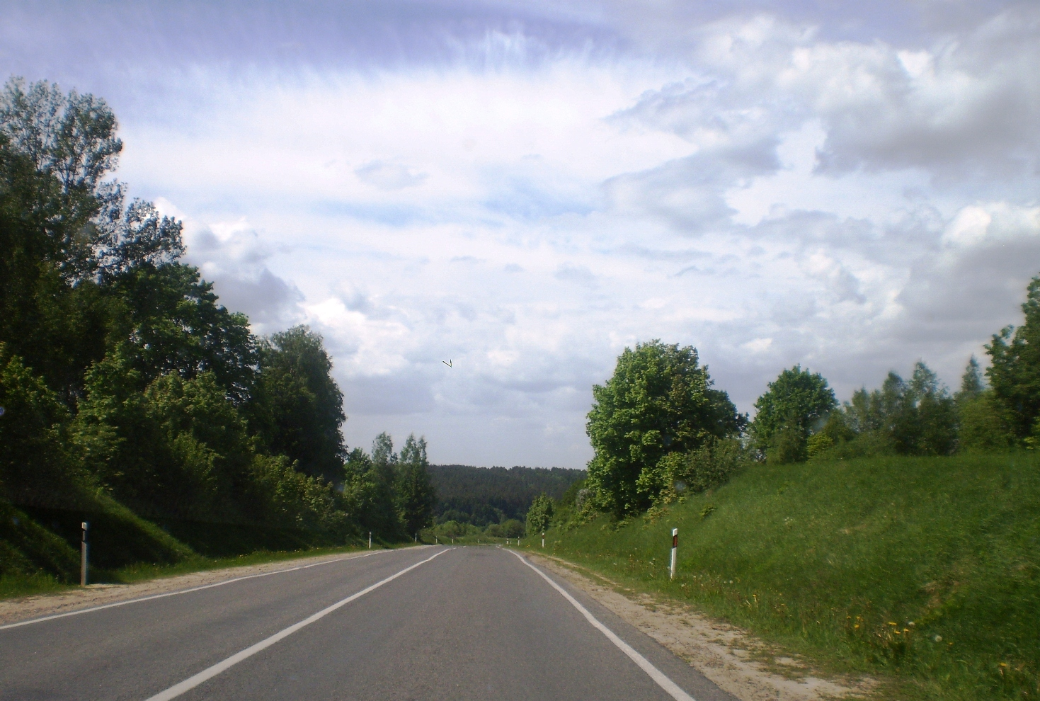 Ariogalos seniūnija. Raseinių raj.